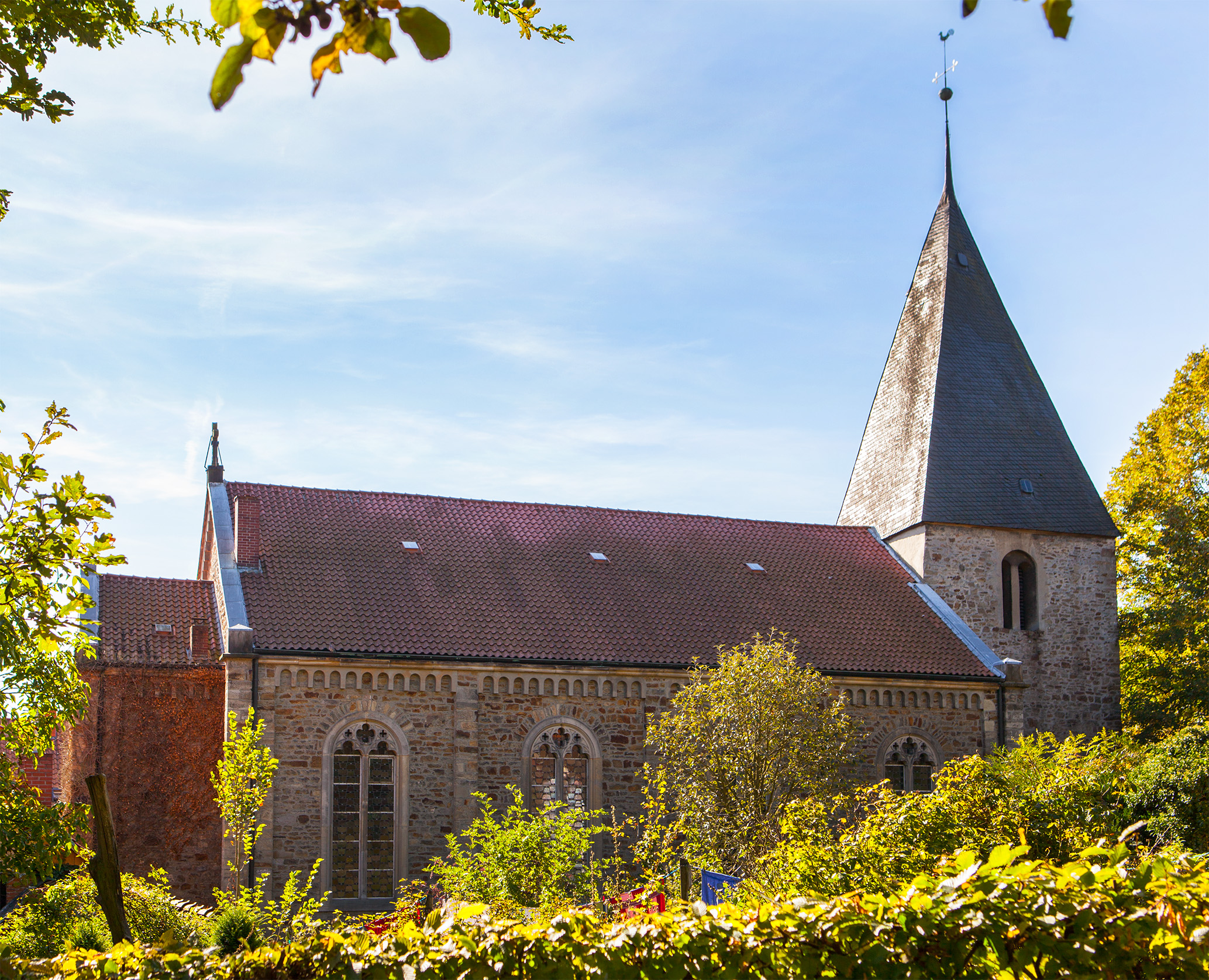 Almena (Extertal), Evangelische KircheThis is a photograph of an architectural monument.